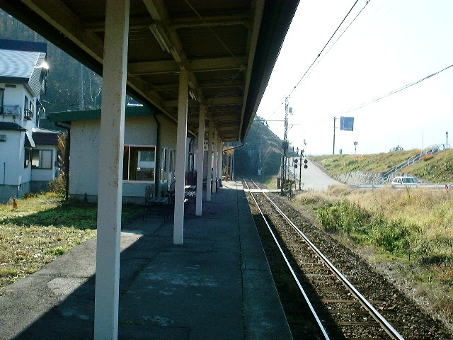 長野電鉄河東線・信濃安田駅のホーム